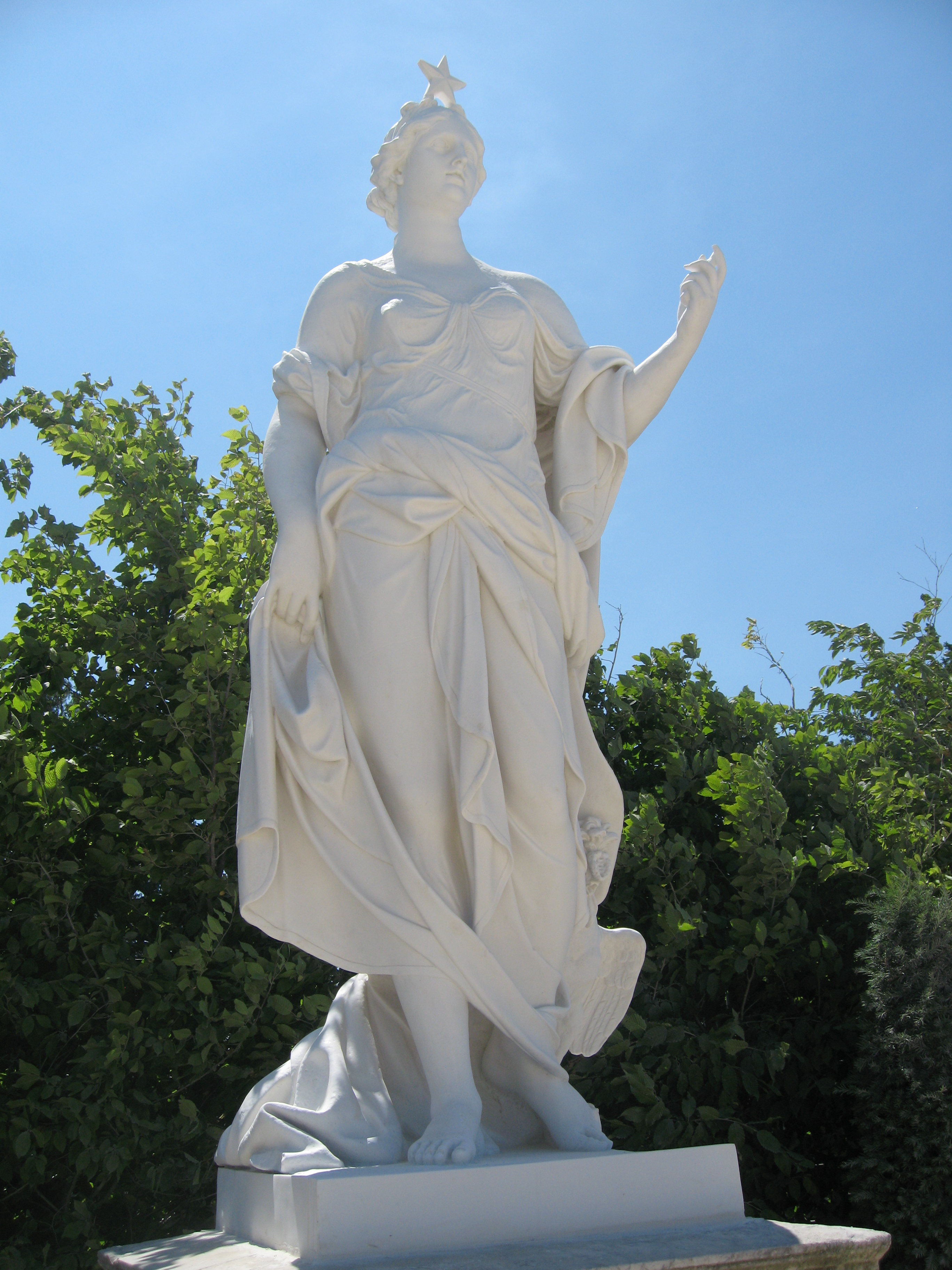 Le Point du Jour par Marsy